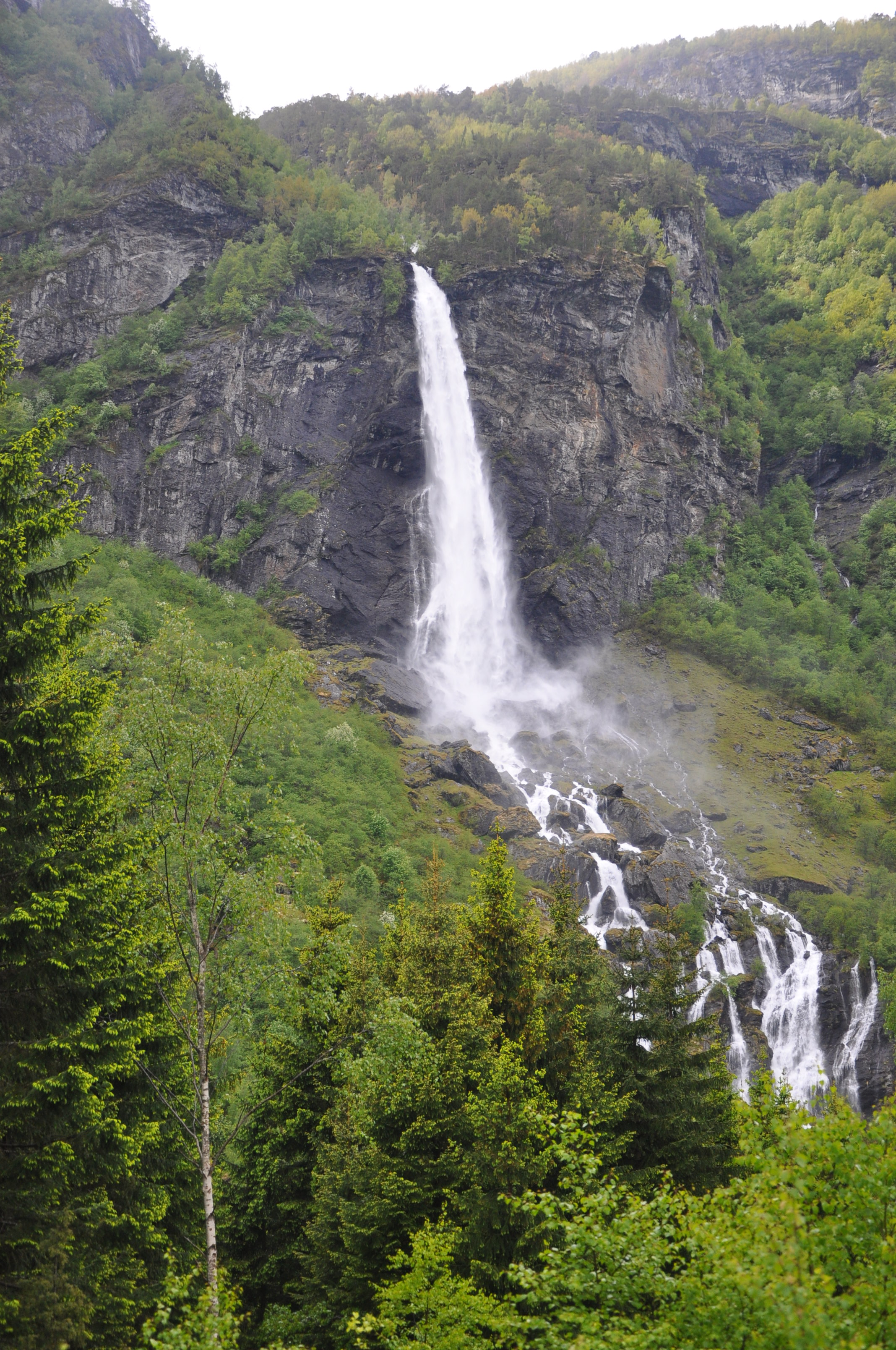 Rjoandefossen